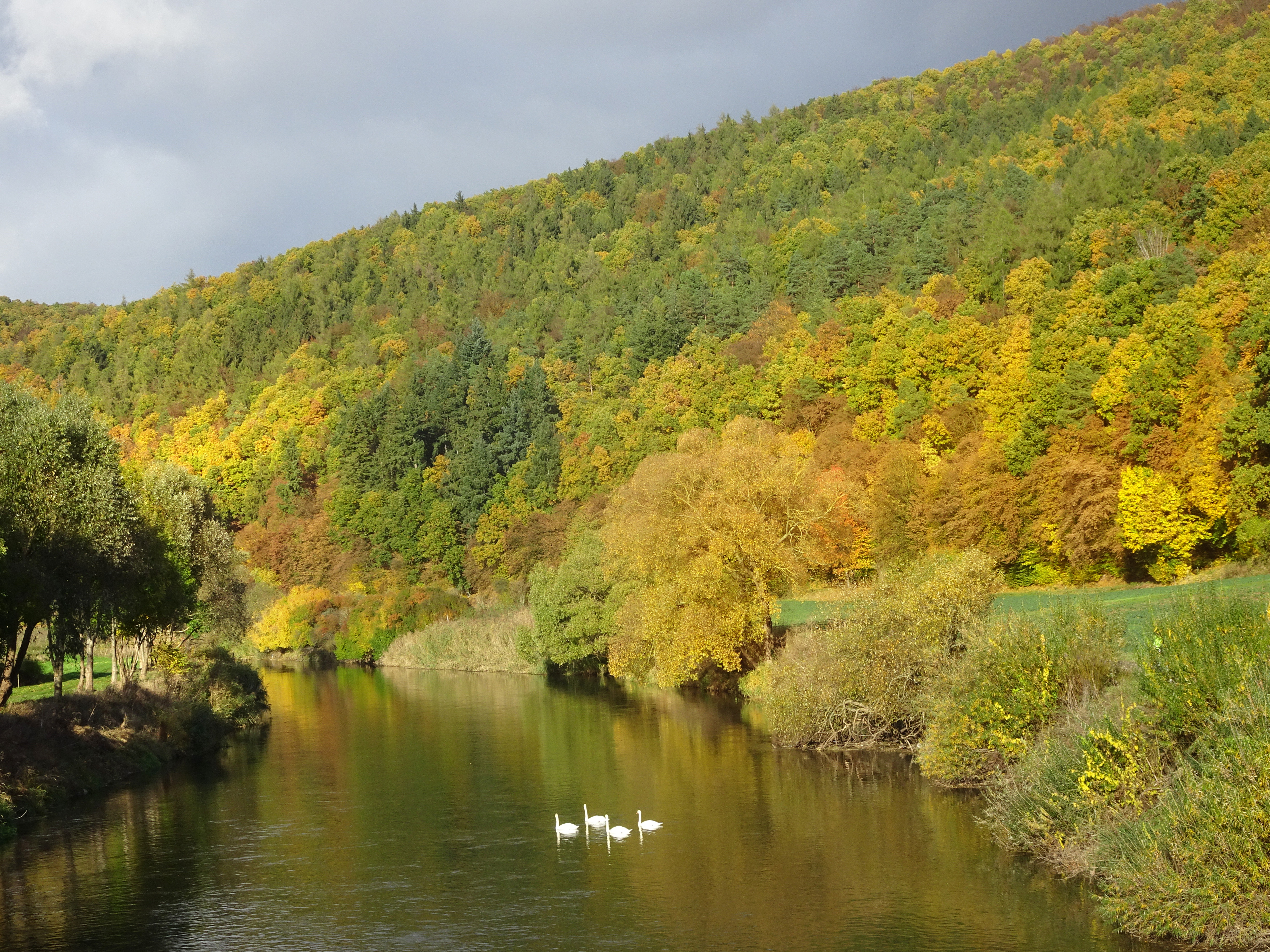 Blick auf die Werra und Uhlenkuppe. Der Bereich gehört zum FFH-Gebiet 4825-302 "Werra- und Wehretal" und liegt im "Geo-Naturpark Frau-Holle-Land". Kameraposition: E09°59.948' / N51°13.762'